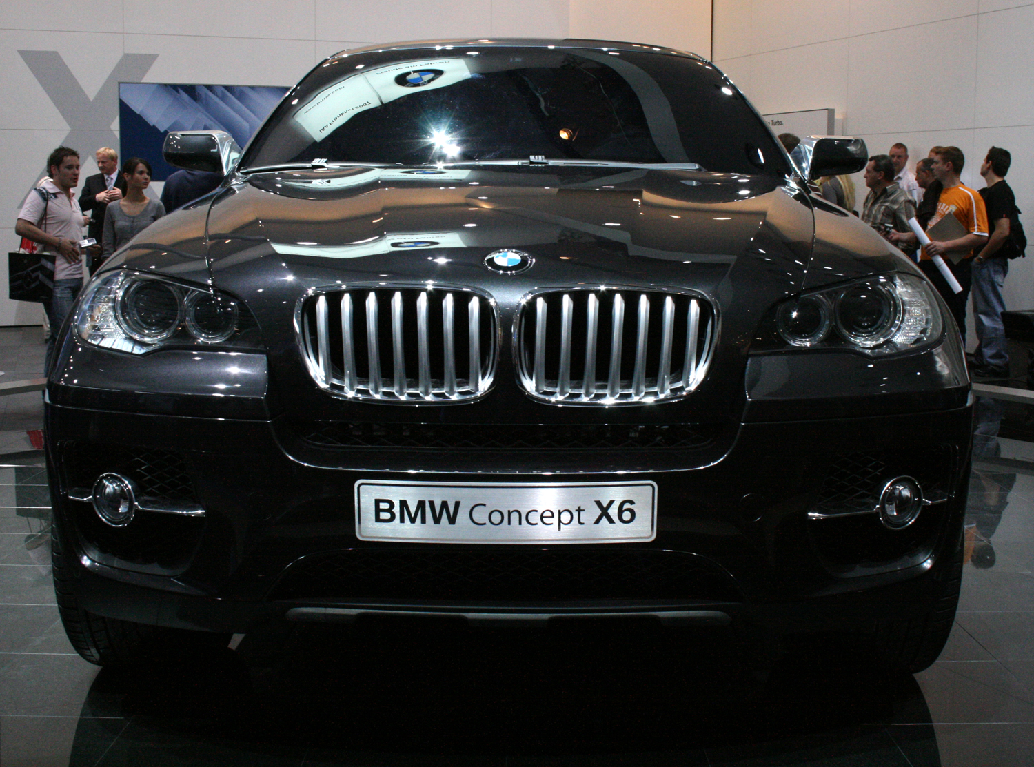 Frontansicht des BMW X6